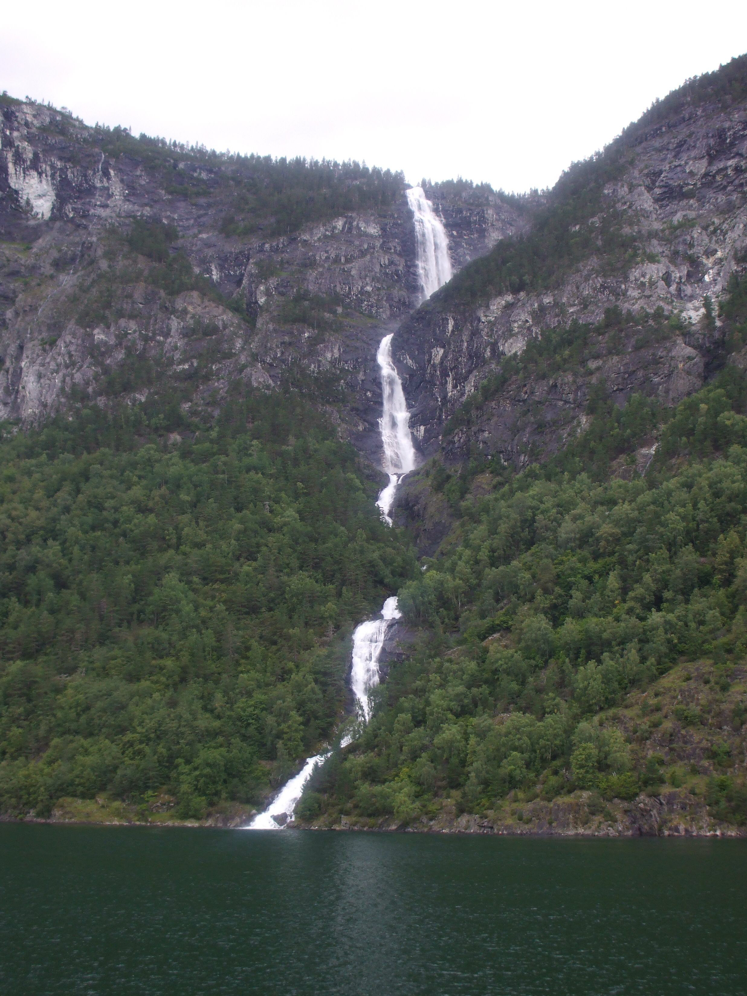 Lægdafossen i Nærøyfjorden i Aurland